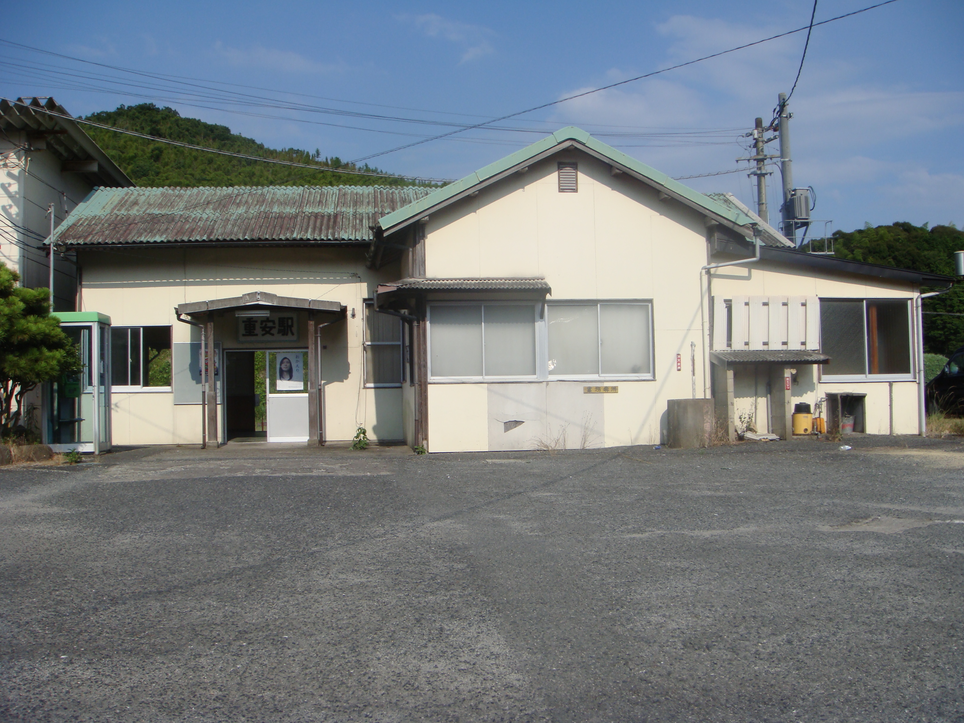 重安駅舎(2008.07.26に投稿者が撮影)